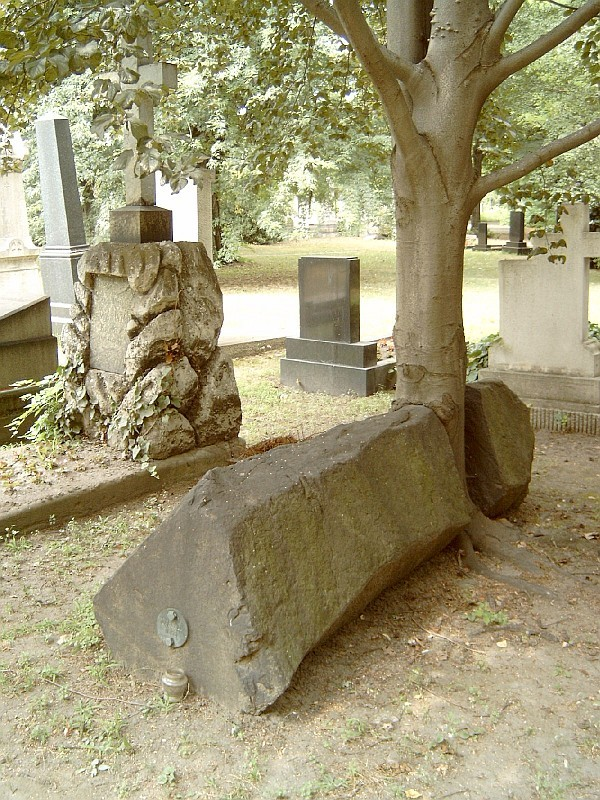 Sarkadi Imre sírja Budapesten. Kerepesi temető: 34/2-1-45 [szobrász: Ortutay Tamás].